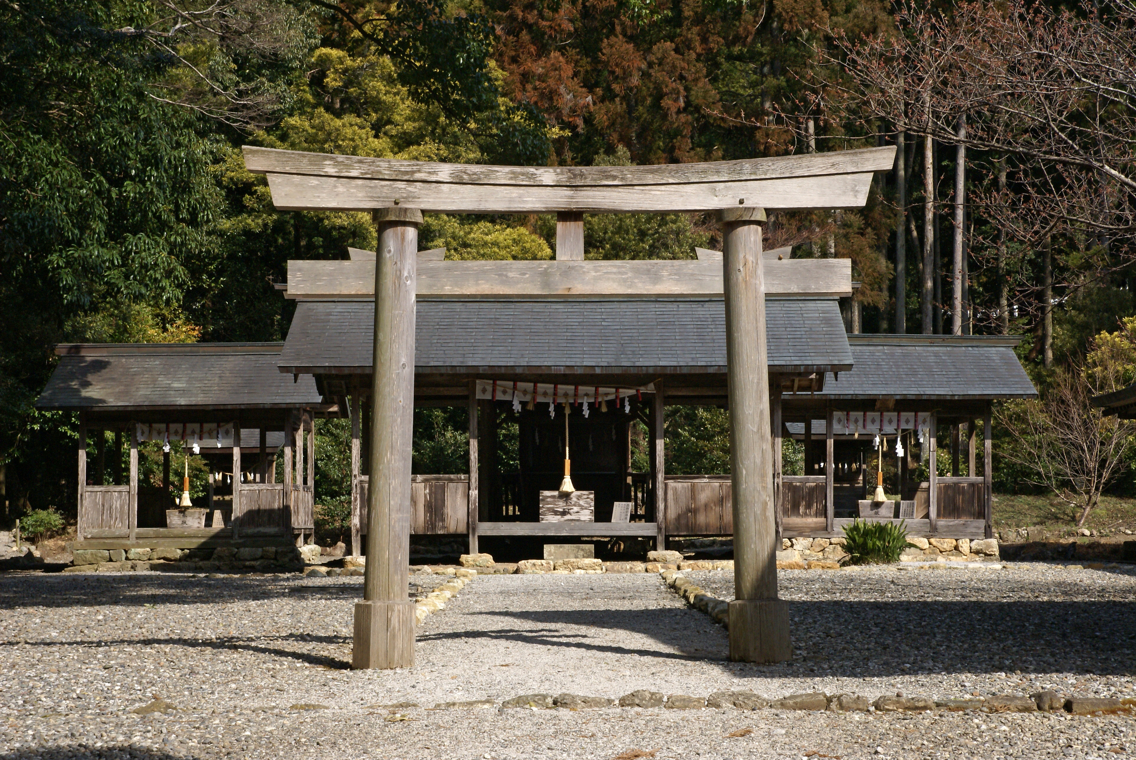 Tosa-jinja in Kochi, Kochi prefecture, Japan